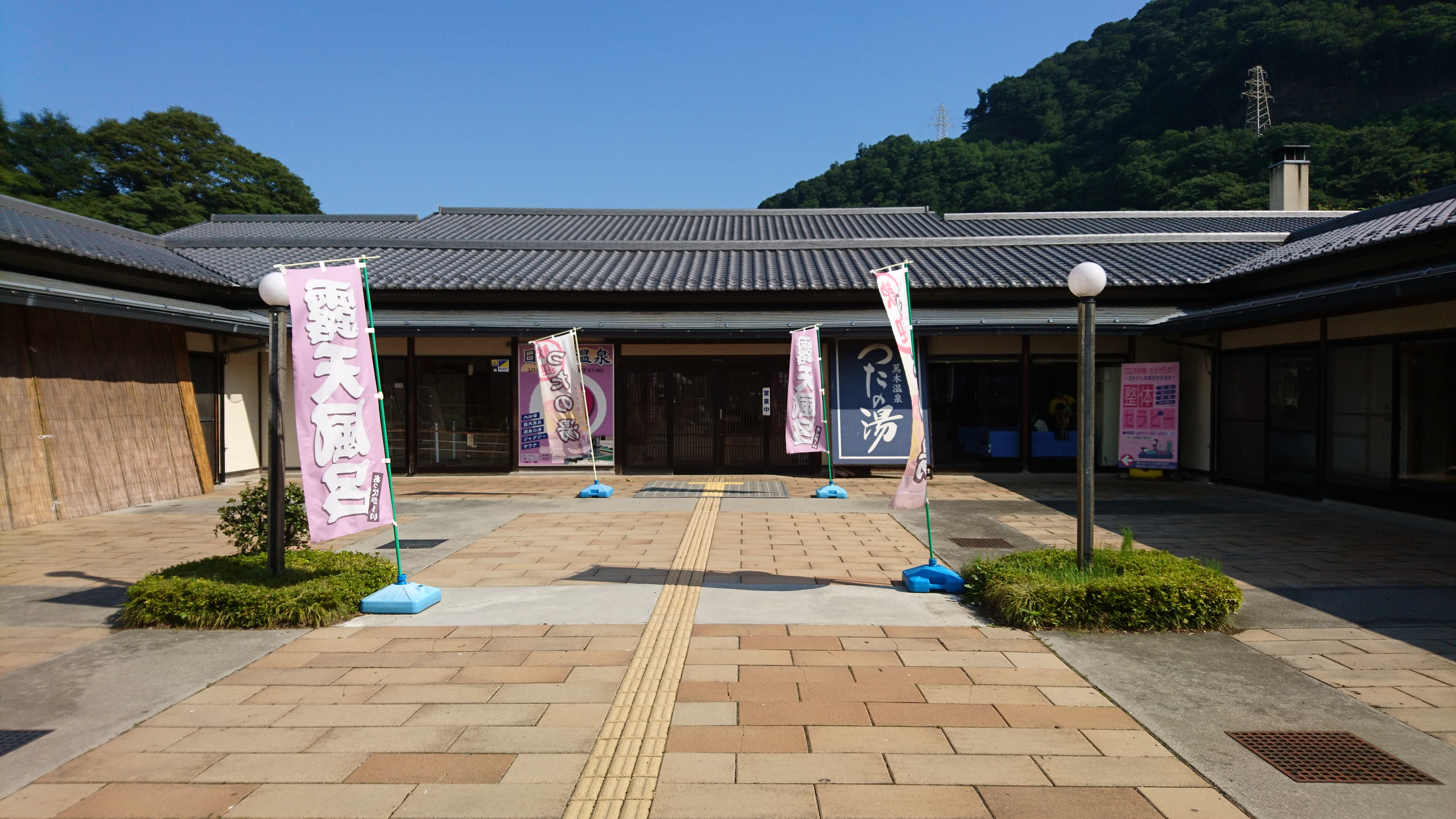 道の駅信州蔦木宿の温泉施設「つたの湯」